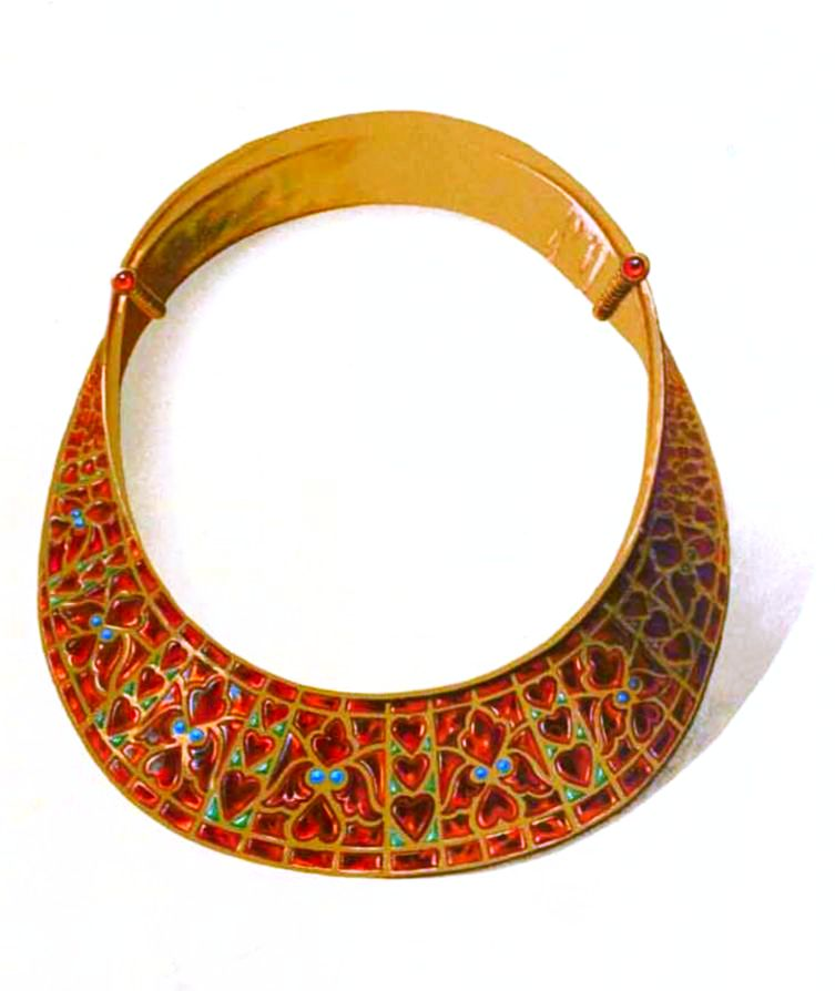 Colanul elipsoidal - reproducere Alexandru Odobescu